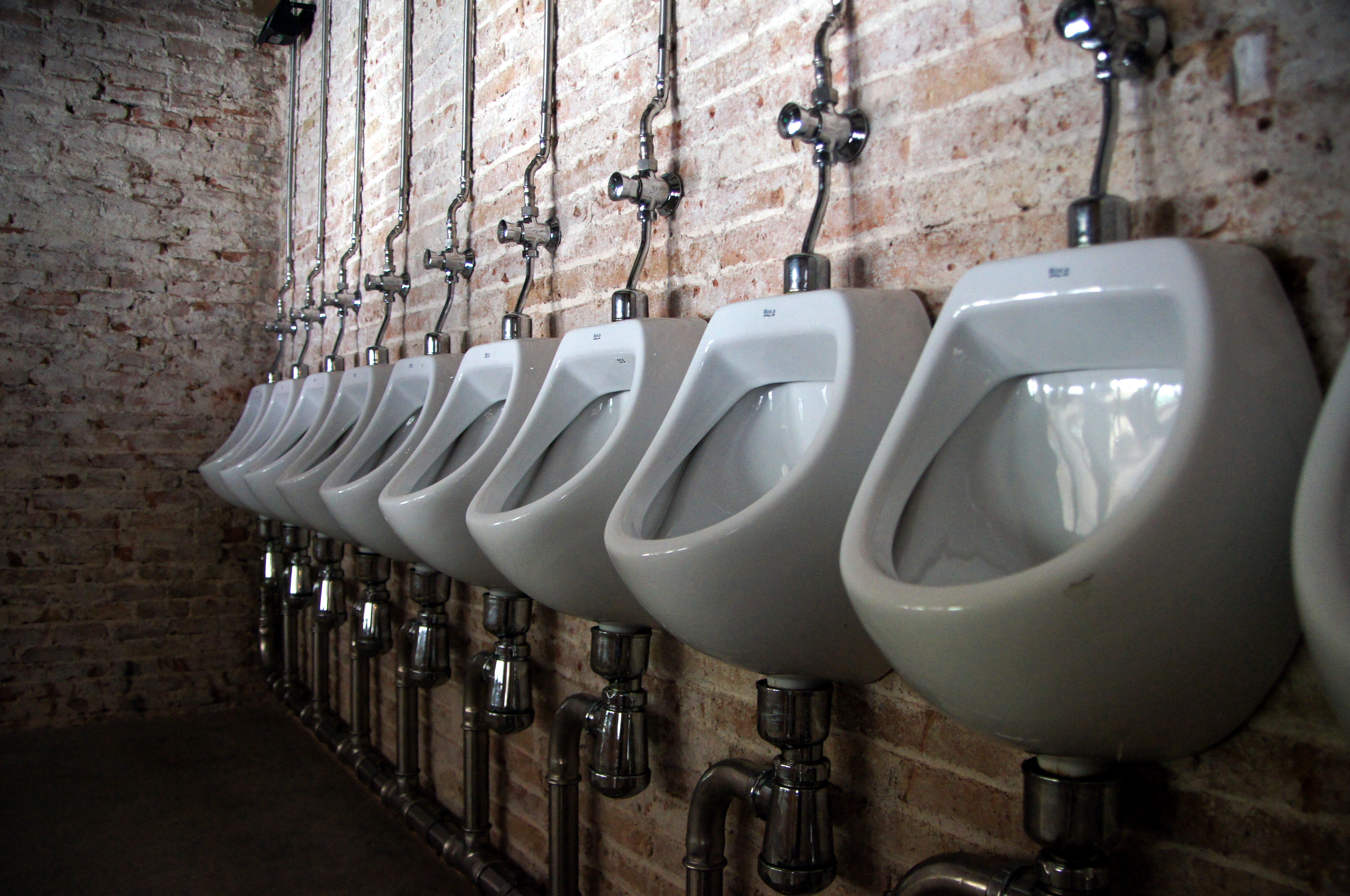 barcelona